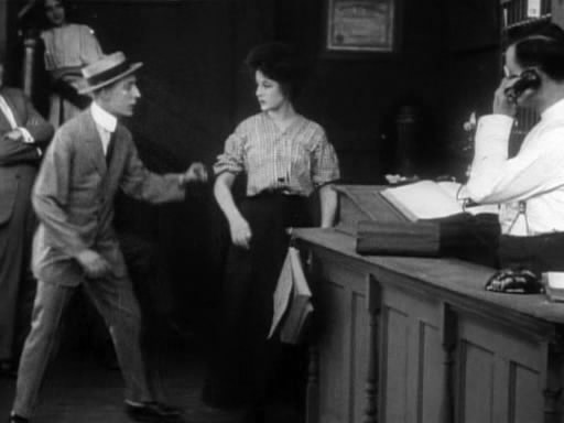 Eric von Stroheim dans "L'invisible ennemi"